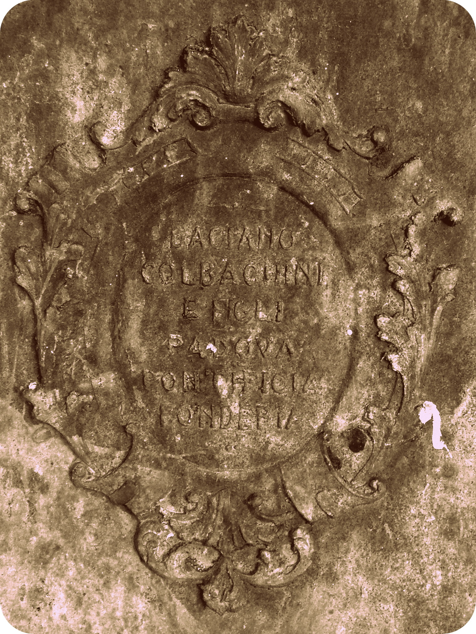 Ficarolo, dettaglio dello stemma della Daciano Colbachini e Figli, azienda di produzione campane, presente su una delle campane prelevate dal campanile della chiesa di Sant'Antonino martire.